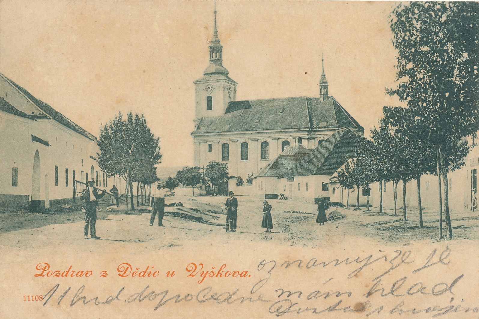 Pozdrav z Dědic u Vyškova, pohlednice prošlá poštou v srpnu 1899. Zachycuje náměstí v Dědicích před postavením budovy školy na začátku 20. století, a několik desetiletí před zbouráním i poté stojících domů na pravé straně. Vedle vytištěného textu "Pozdrav z Dědic u Vyškova" připsán text: "oznamuji že je 11 hod. dopoledne mám hlad kvetak s hovezim". Na druhé straně pod tiskem "Dopisnice Correspondenz Karte.", který je oražen razítkem s textem "PRODLITZ 8 99 BRODEK U NEZAMYSLIC" (do Brodku pohled přišel a tam byl tímto razítkem orazítkován), je tužkou kurzívou napsáno "Spanilomyslná slečn(a) sl. Ema Freibergrova, Brodek u Nezamyslic". Přes známku s císařem Františkem Josefem I. oraženo poštovní razítko: ""DIEDITZ b WISCHAU DĚDICE u VYŠKOVA" (z Dědic byl pohled odeslán). Do roku 1906 se používala tzv. dlouhá adresa (viz zadní strana fotografické pohlednice) a texty byly pisateli připisovány na přední stranu pod grafiku. Od roku 1906 začala být používána adresa a na psaní bylo vyhrazeno více volného místa.